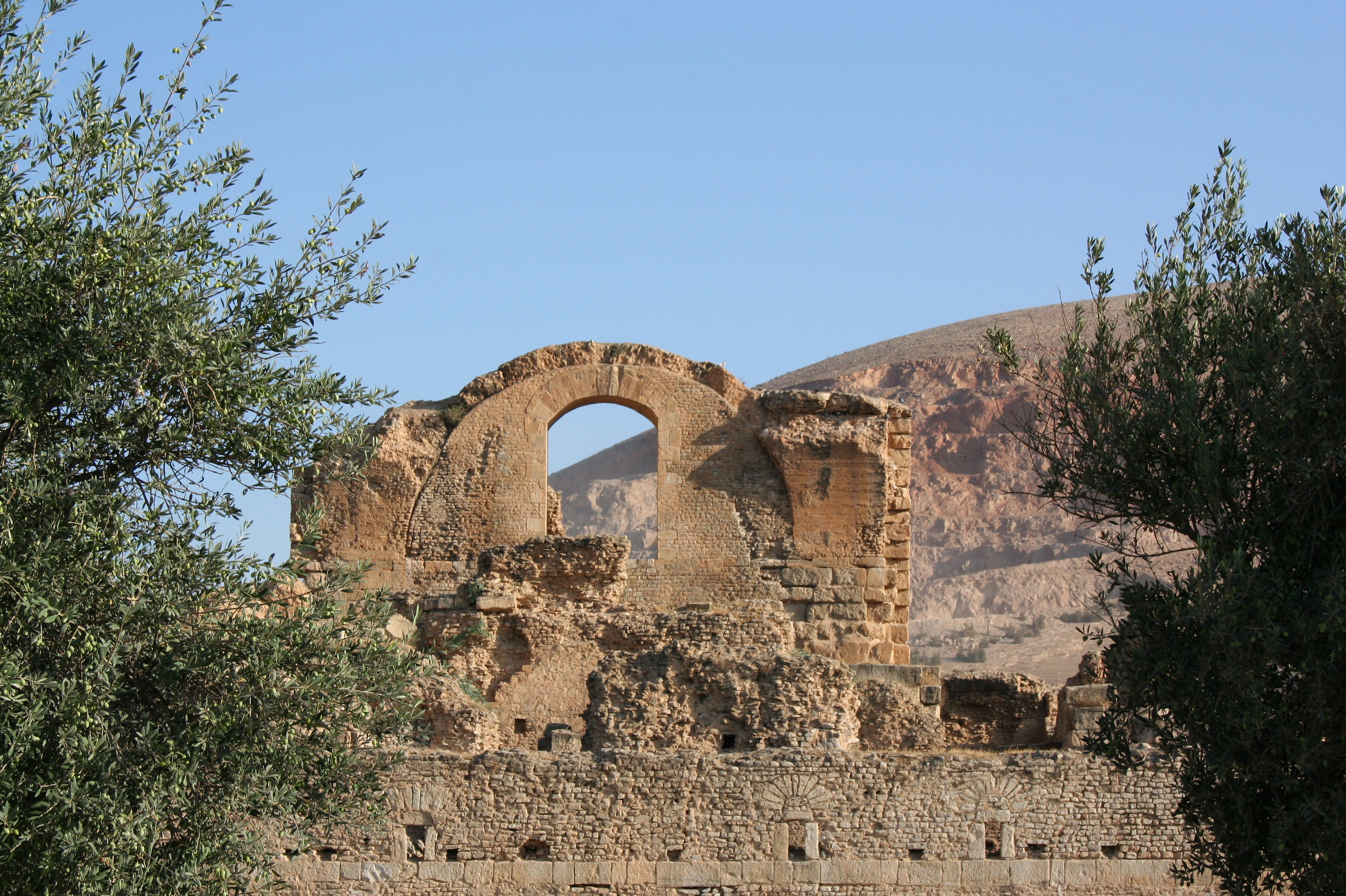 Thermes de Bulla Regia vus de l'antiquarium